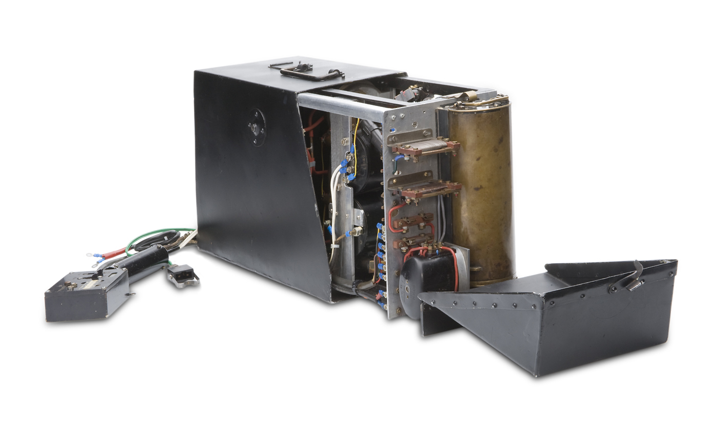 Photo by Marika Tamminen, Vapriikki Photo Archives